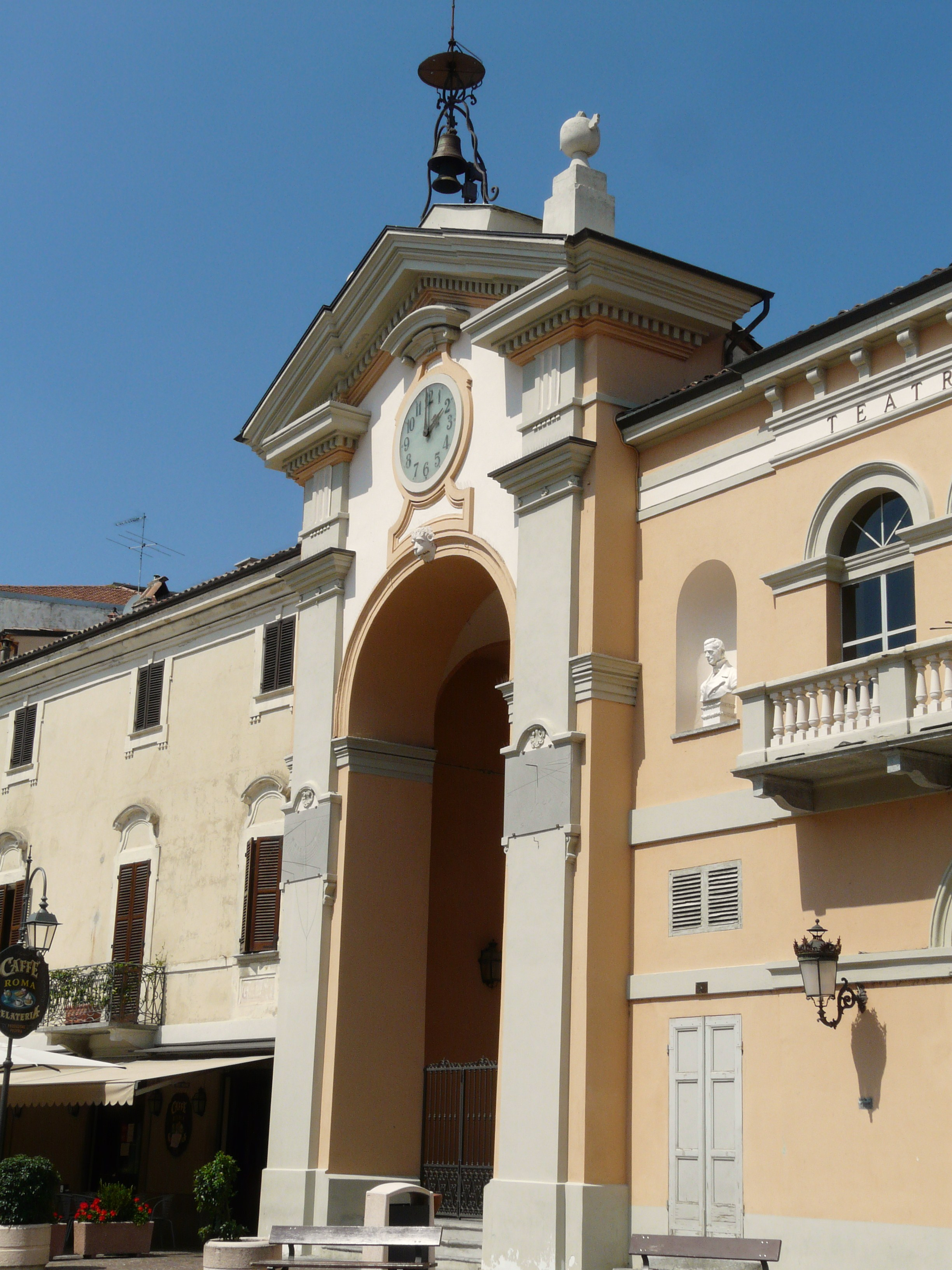 Teatro civico, Moncalvo, Piemonte, Italia